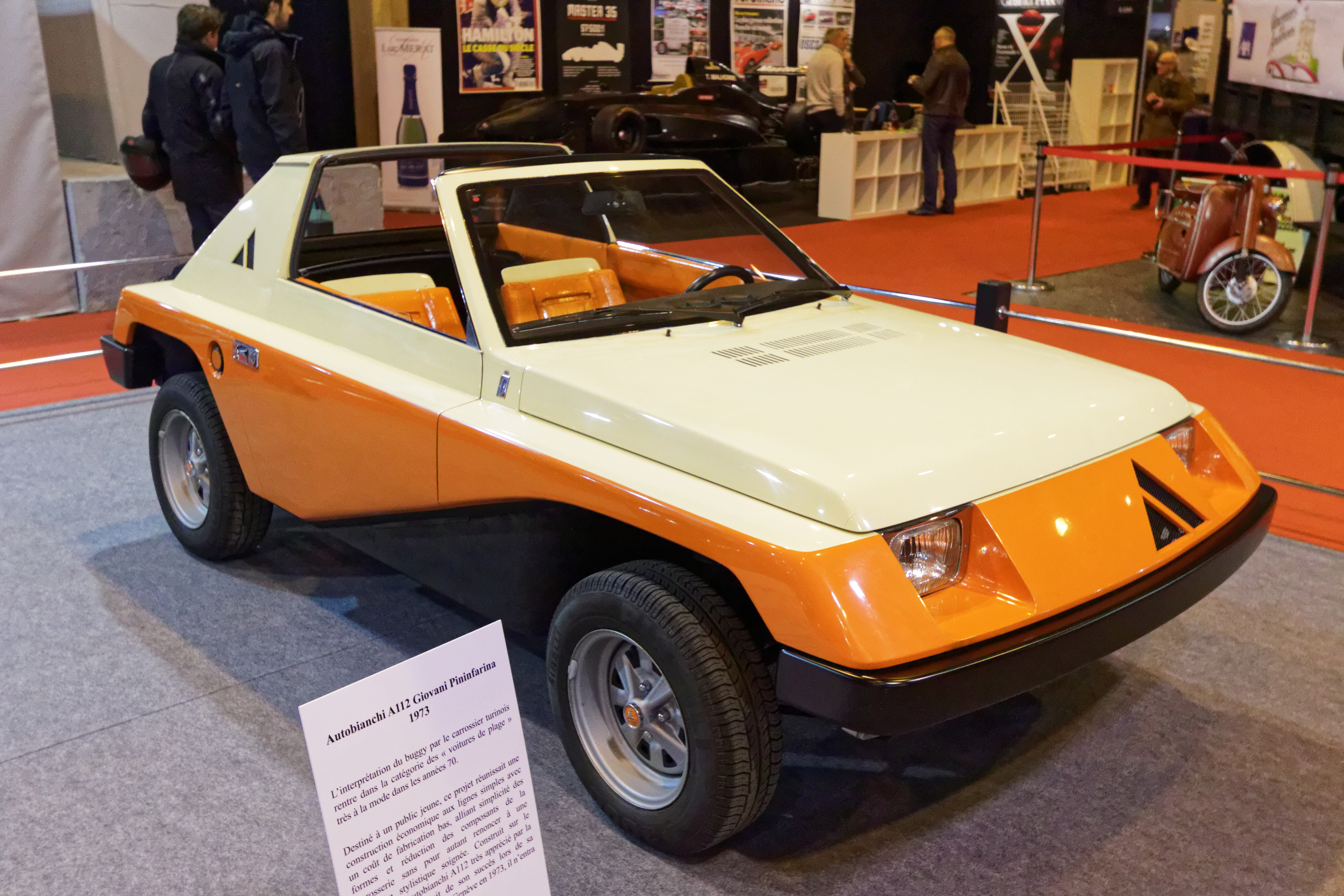 Une des voiture présentée lors du salon Rétromobile de Paris 2015